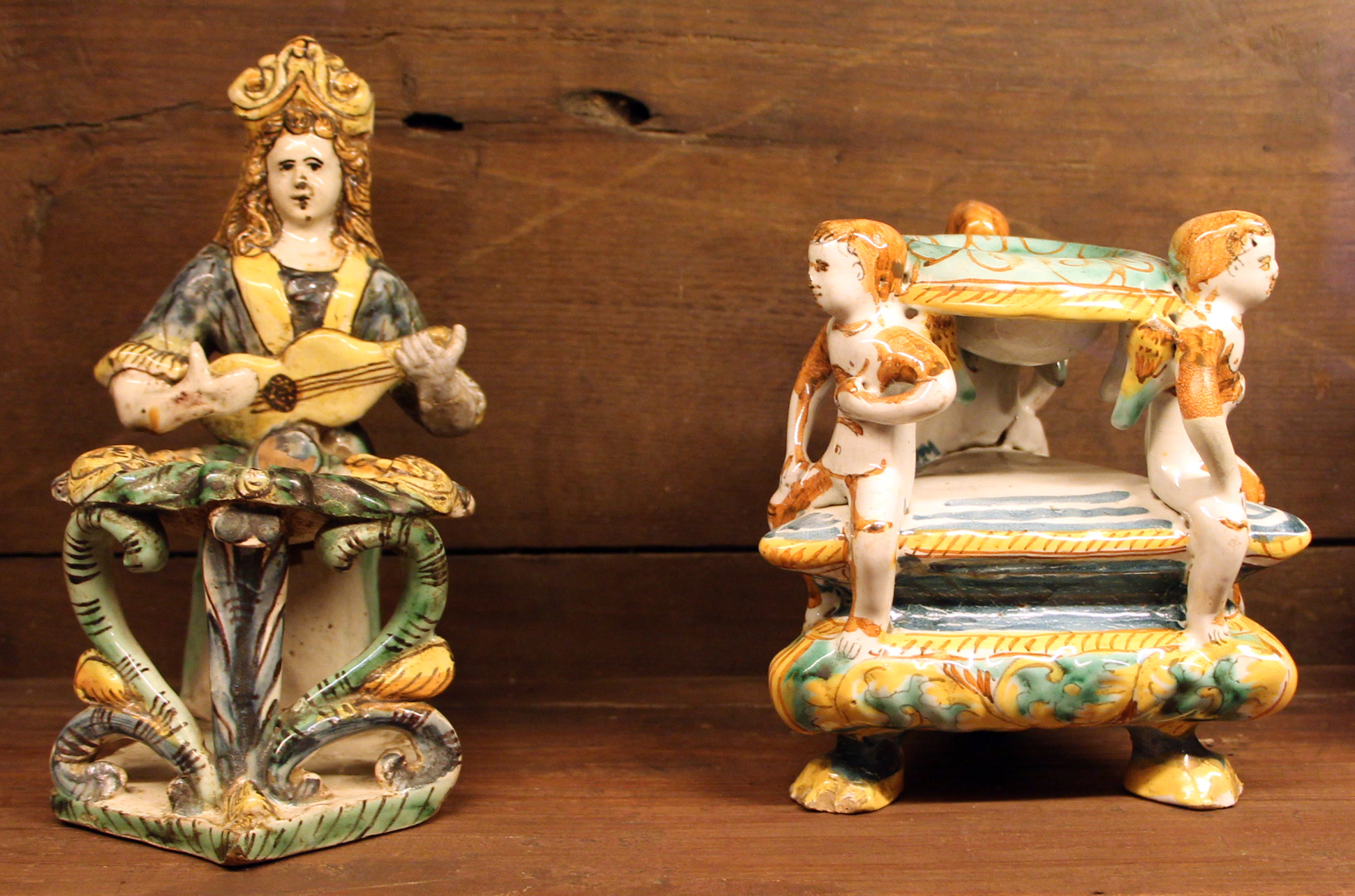 Maiolica di Ariano Irpino - Museo della Casa fiorentina Antica - Palazzo Davanzati - MIBAC The making of this document was supported by Wikimedia CH. (Submit your project!) For all the files concerned, please see the category Supported by Wikimedia CH. This is a photo of a monument which is part of cultural heritage of Italy.